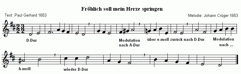 Noten von "Fröhlich soll mein Herze springen", gesetzt und erklärt von Joachim Mohr